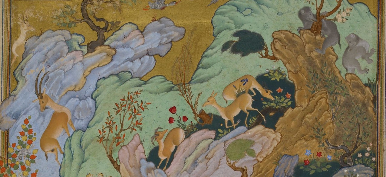 Ağa Mirək - Məcnun heyvanlar arasında detal.